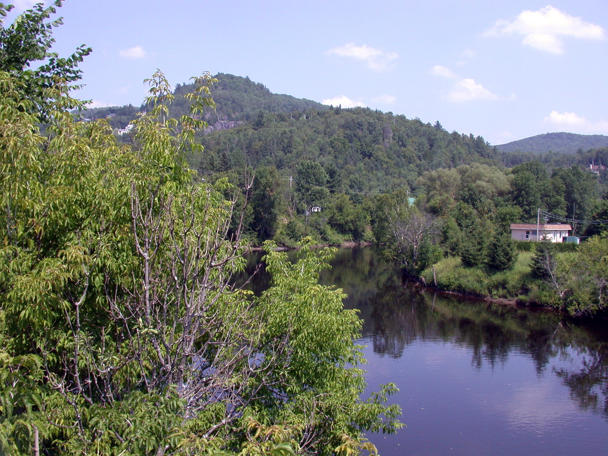 Rivière du Nord, Piedmond, Québec, Canada